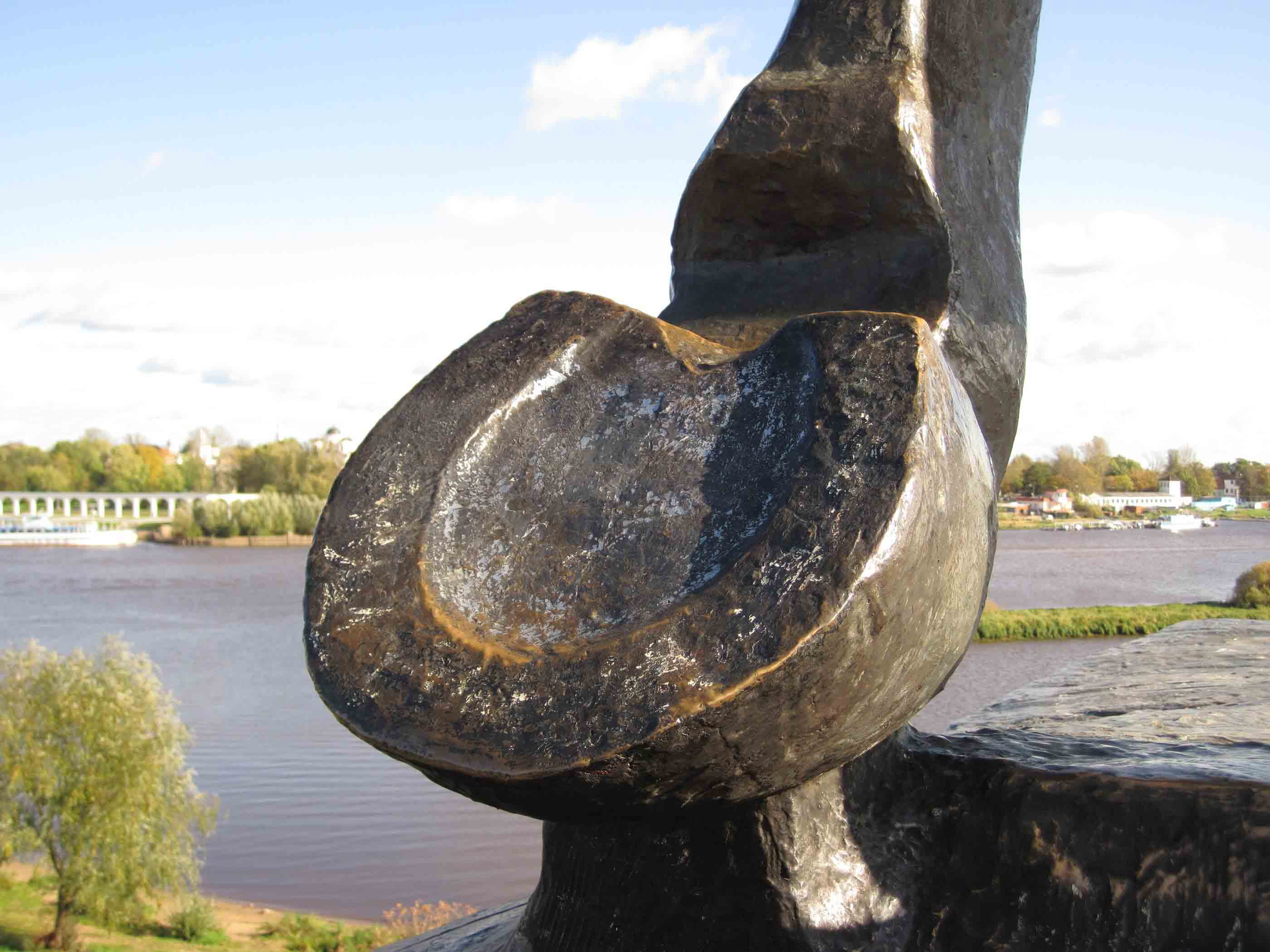 Копыто коня Монумента Побыды в Великом Новгороде